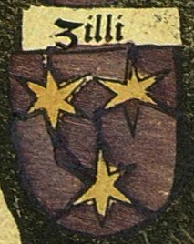 Celjští